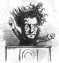 Caricature de Germain Sarrut (1800-1868) par Cham.